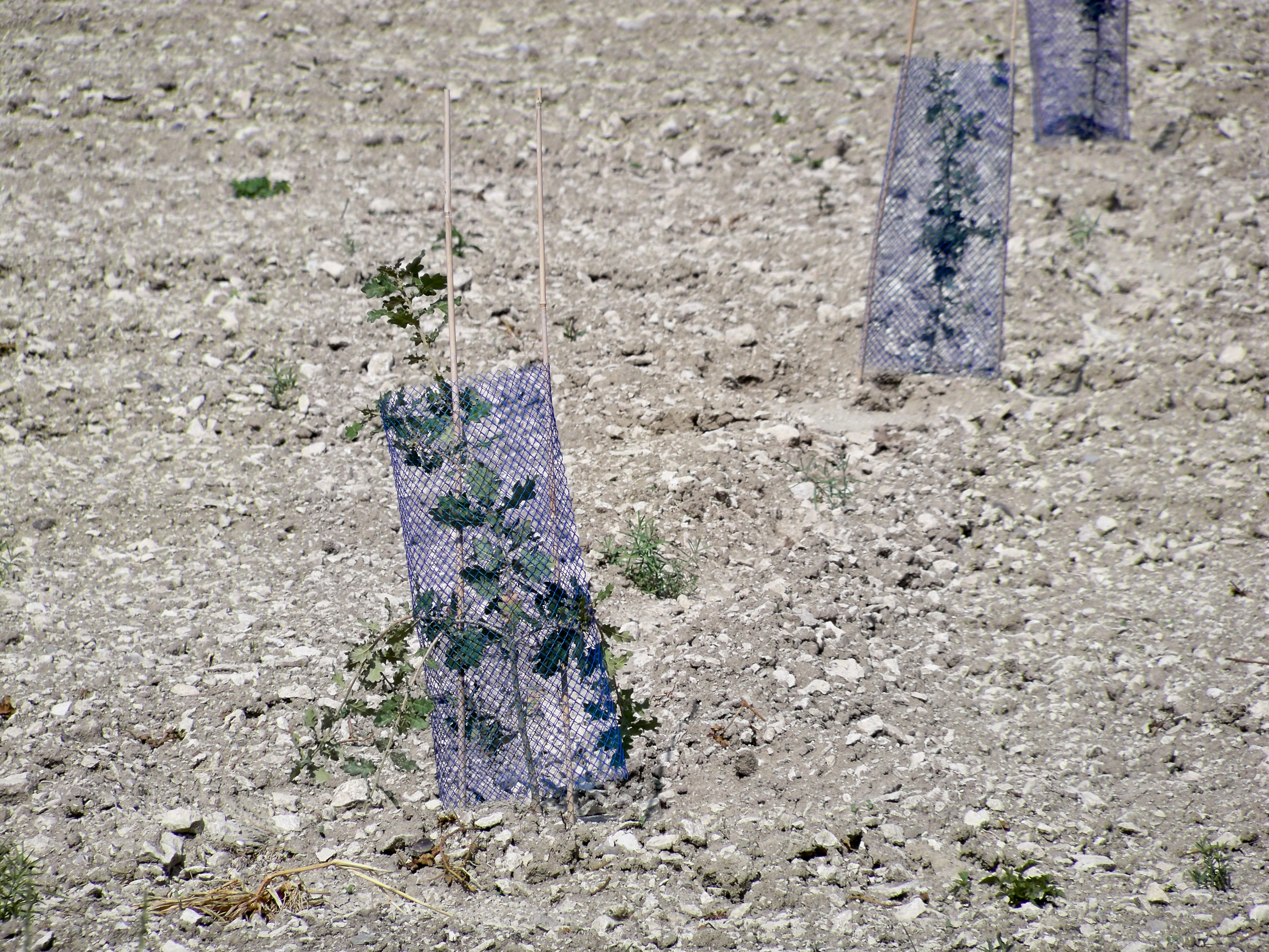 Truffière en devenir, à Velleron (84)